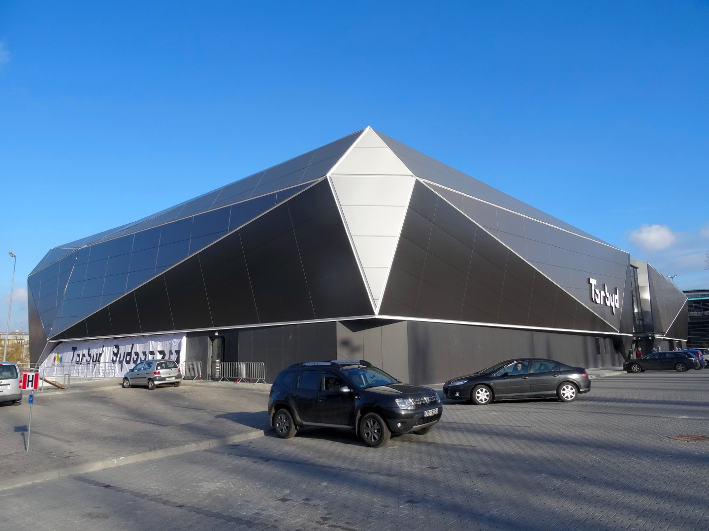 Sztuczne lodowisko "Torbyd" w Bydgoszczy, ul. Toruńska 59